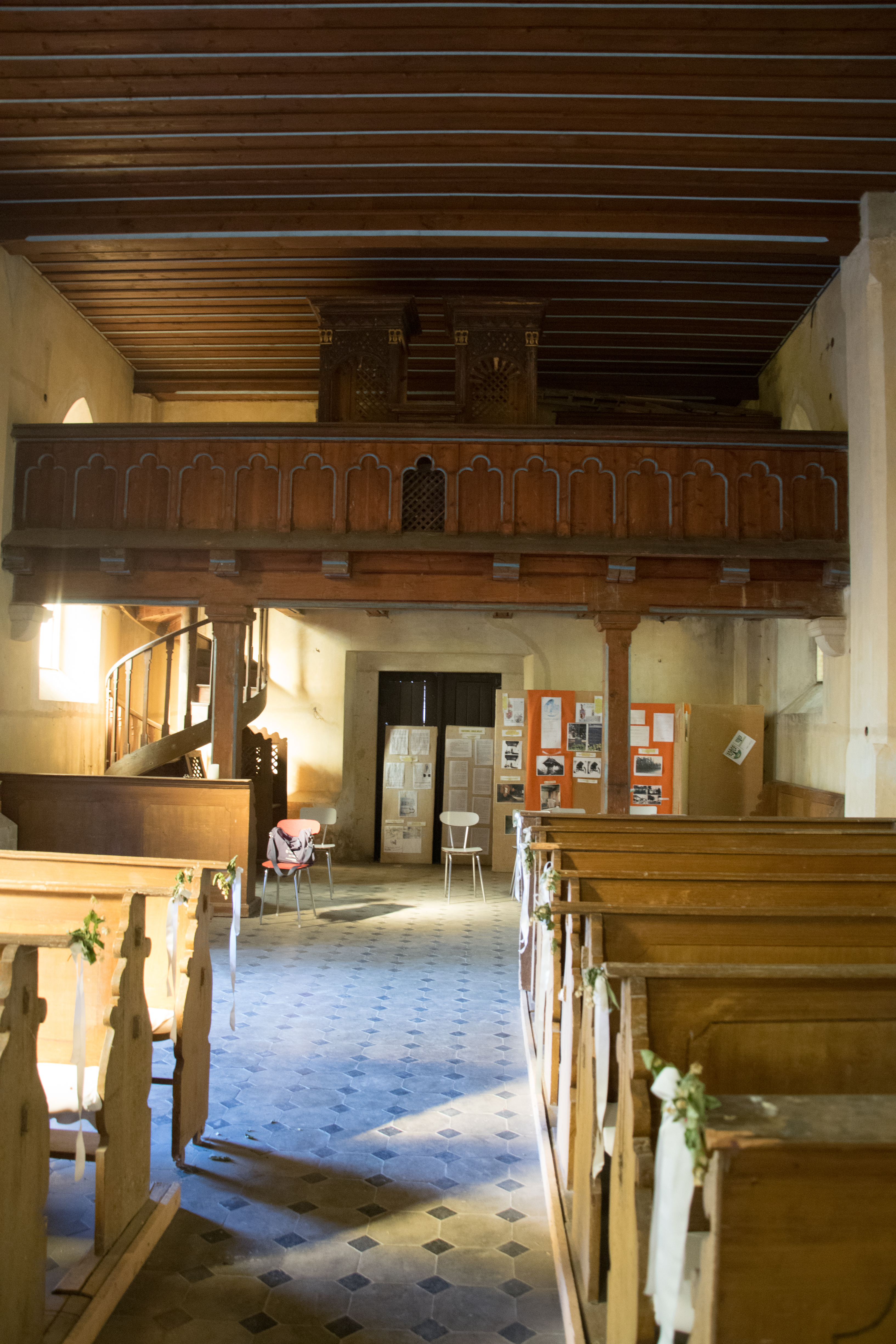 interiér kostela sv. Mikuláše v Bělči, pohled na kruchtu a hlavní vchod